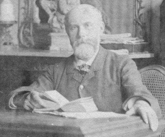 Adrien Arcelin, archéologue et archiviste